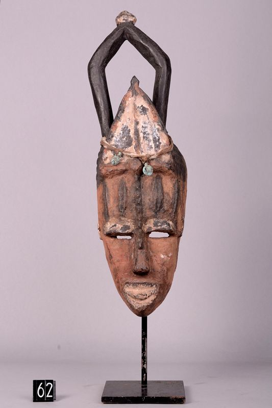 Maschera facciale Opha - Volto allungato di forma triangolare con mento a punta. L'enfasi cade sulla fronte ampia attraversata dalle scarificazioni verticali tipiche dell'etnia urhobo. Sommità della testa a cuspide con corna che piegano verso il centro fino a congiungersi. Patina crostosa rossastra. Queste maschere rendono onore alle spose urhobo (opha) e danzano in occasione dei festival che celebrano la divinità delle acque Ohworhu, le cui origini rimandano all'area più meridionale della Nigeria, nel delta del fiume Niger (Foss 2004). Le maschere opha rendono manifesto il ruolo che gli spiriti delle acque rivestono nel proteggere le giovani donne. Queste maschere sono viste nel contempo come belle e temibili; la loro bellezza non è però quella che appare all'occhio umano, ma quella che è apprezzata dagli spiriti: la maschera sarà tanto più bella quanto più somigliante agli spiriti stessi.